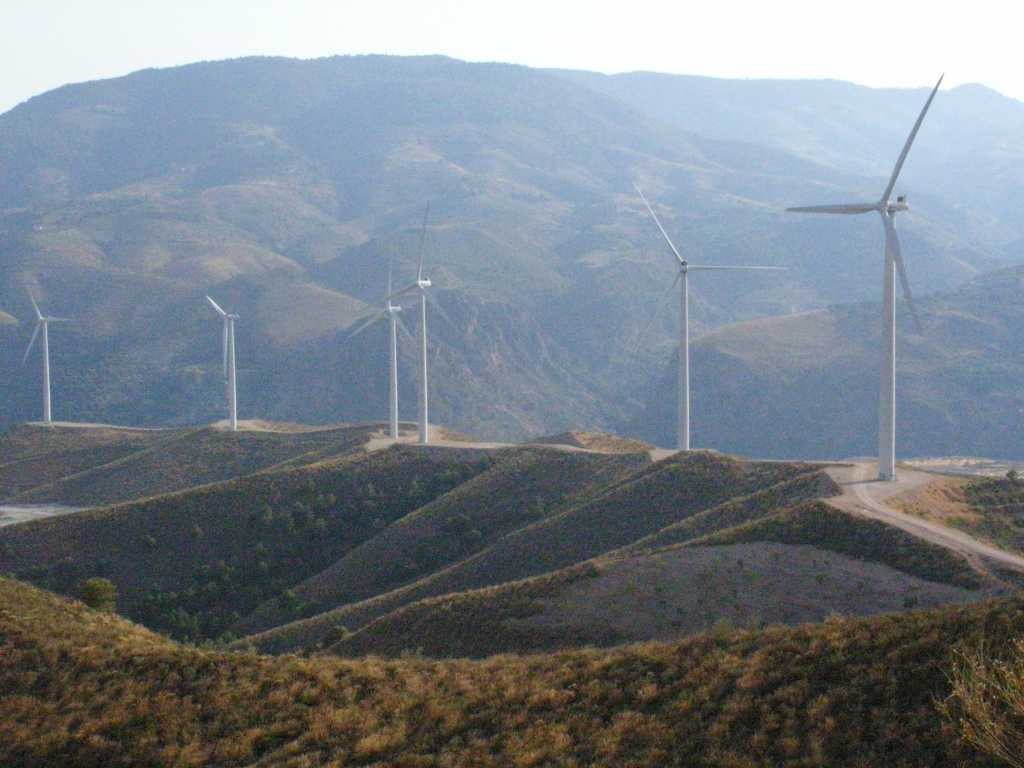 Windkraftanlagen bei Lanjarón (Granada)